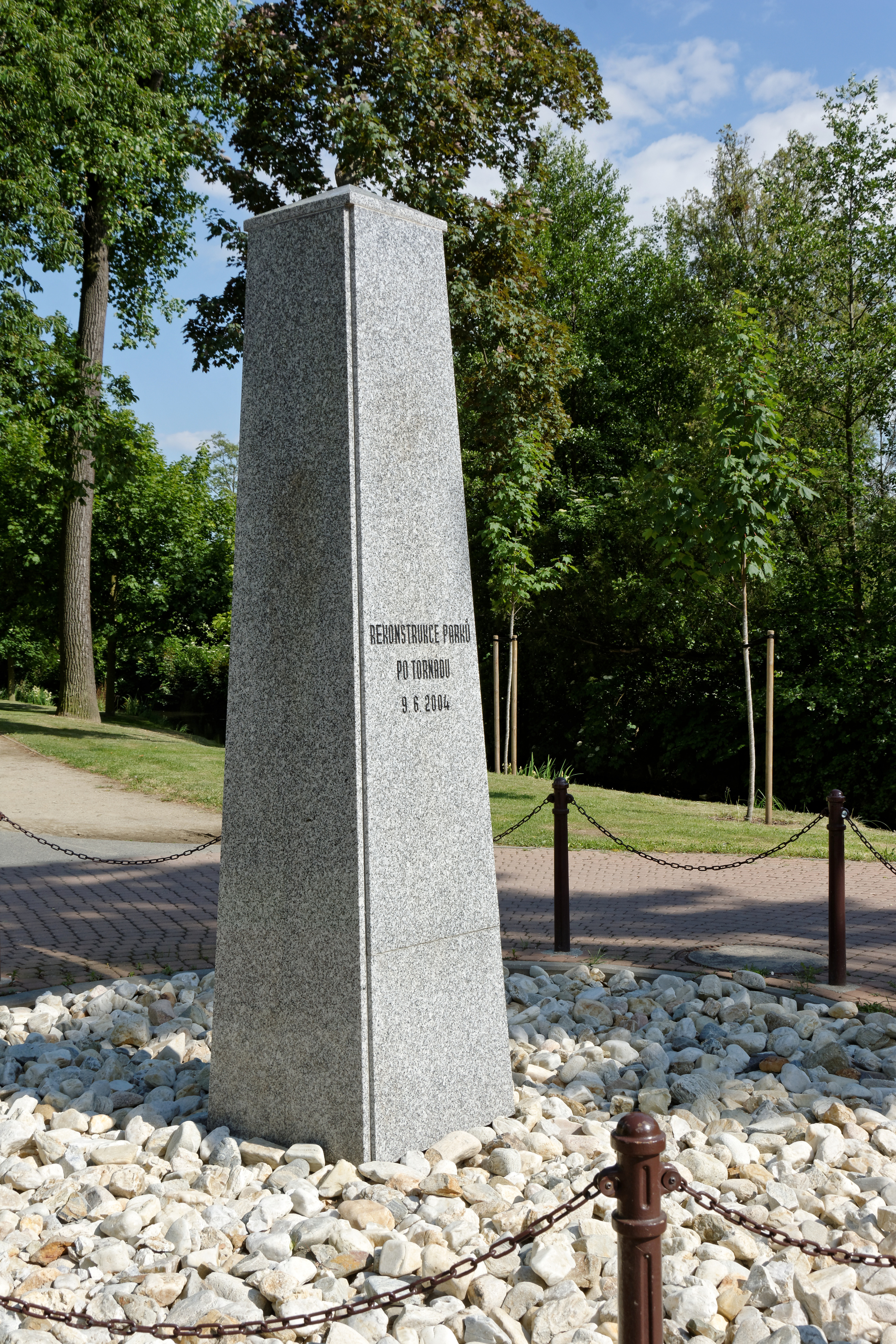 Litovel, park za Husovým sborem, Památník tornáda, které postihlo město 9. června 2004. Památník zbudován v roce 2008.